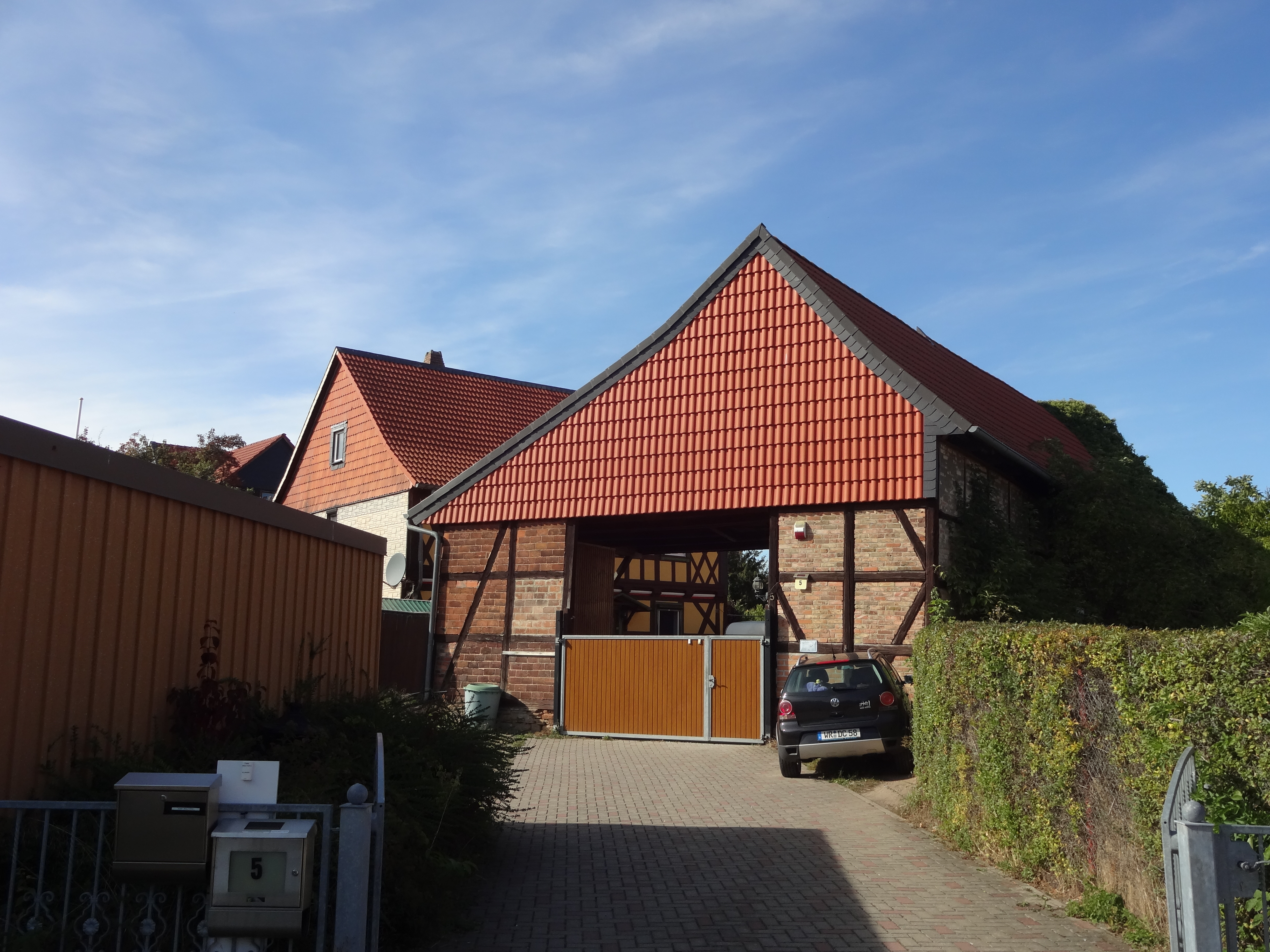 denkmalgeschützter Bauernhof in der Ilsenburger Straße 5 in Drübeck